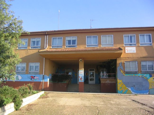 CRA de Fonfría